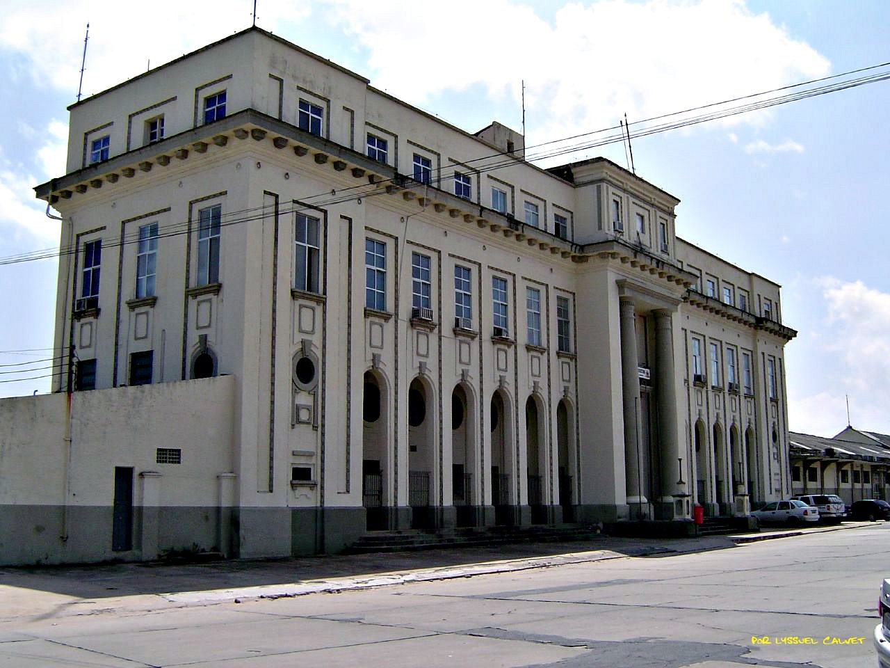 Antiga Rede Ferroviária Federal S.A. - RFFSA.